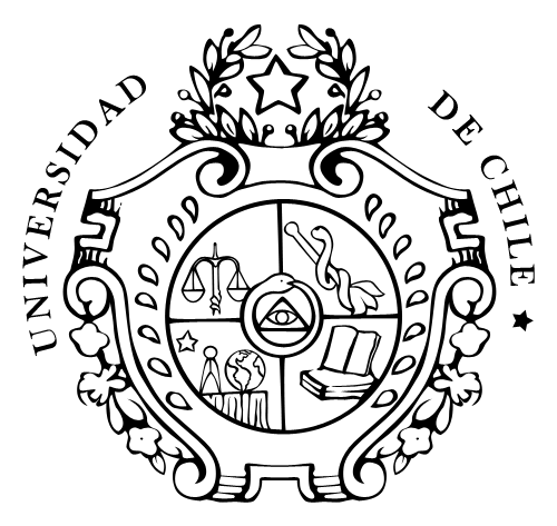 Logo antiguo de la Universidad de Chile